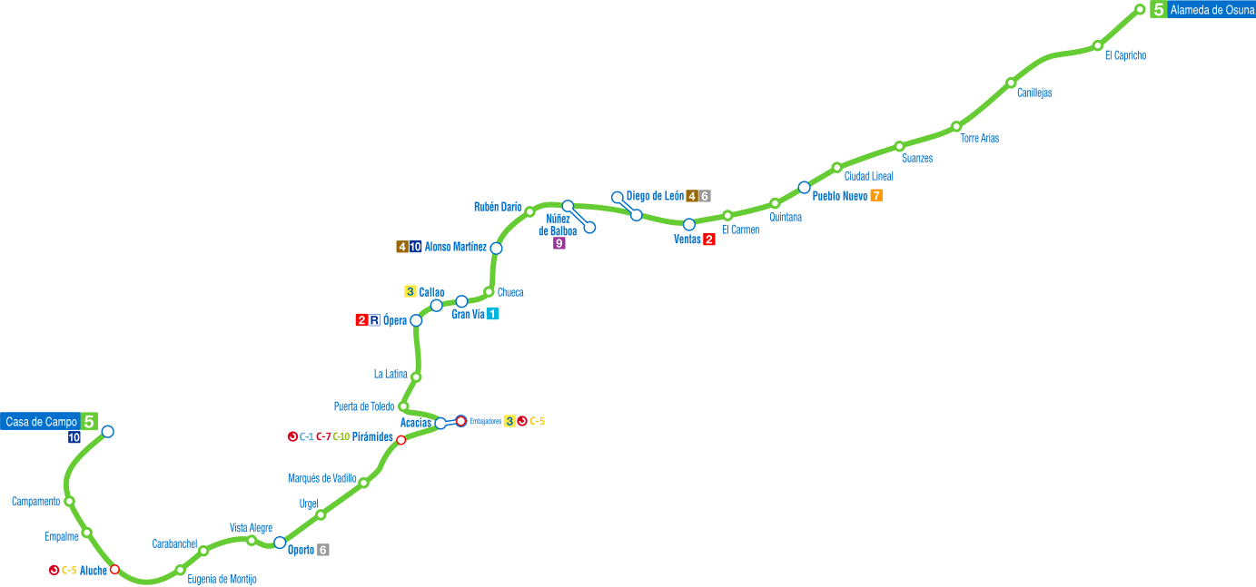 Recorrido de la línea 5 del Metro de Madrid